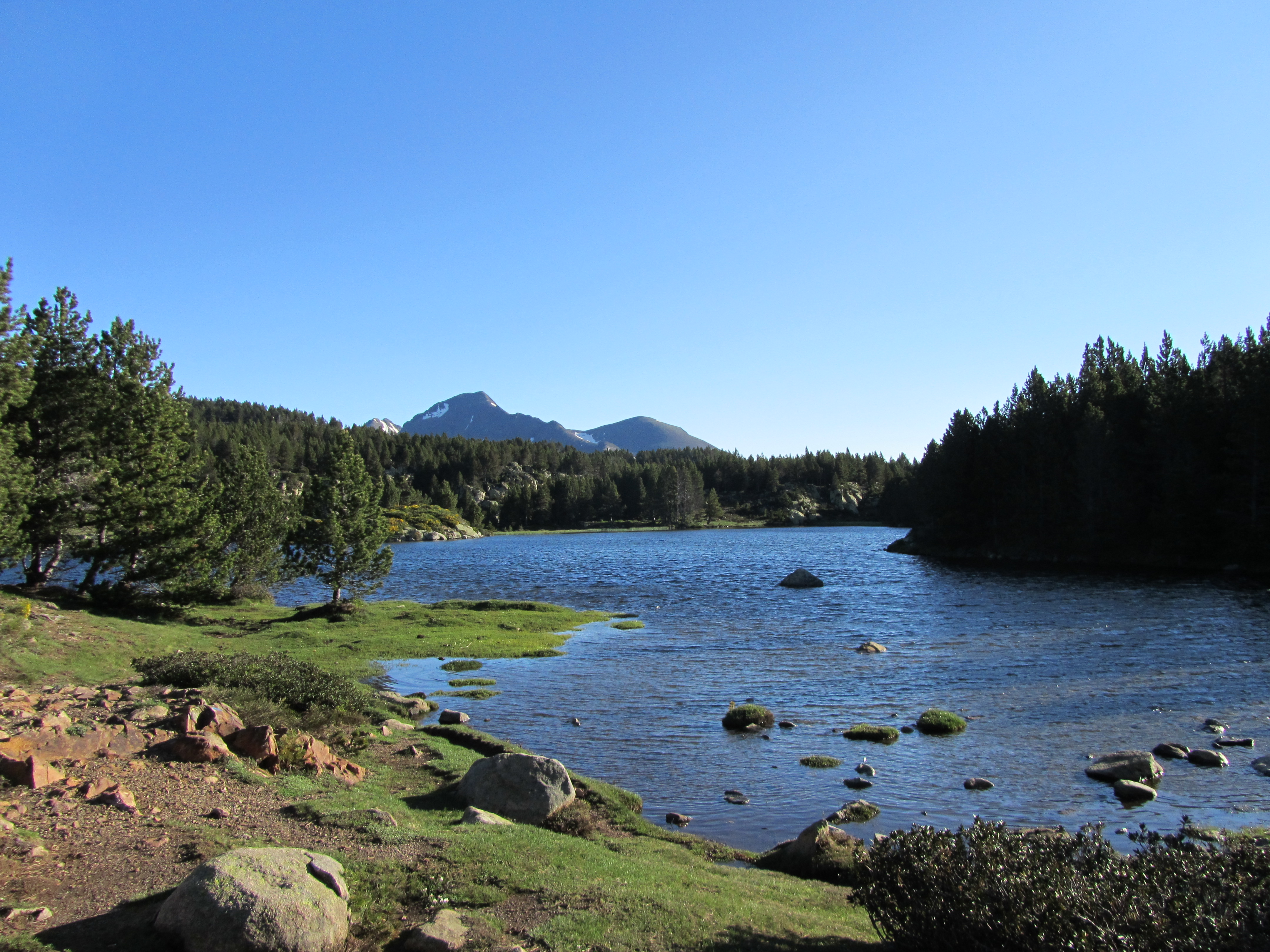 Lac Vivé